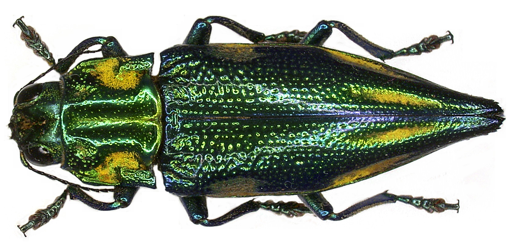 Familie: Buprestidae Grösse: 29 mm Fundort: Indonesien, Irian Jaya, Salawati-Isl., Kaliam leg. A.Skale, 2004; det. M.Niehuis Foto: U.Schmidt, 2006